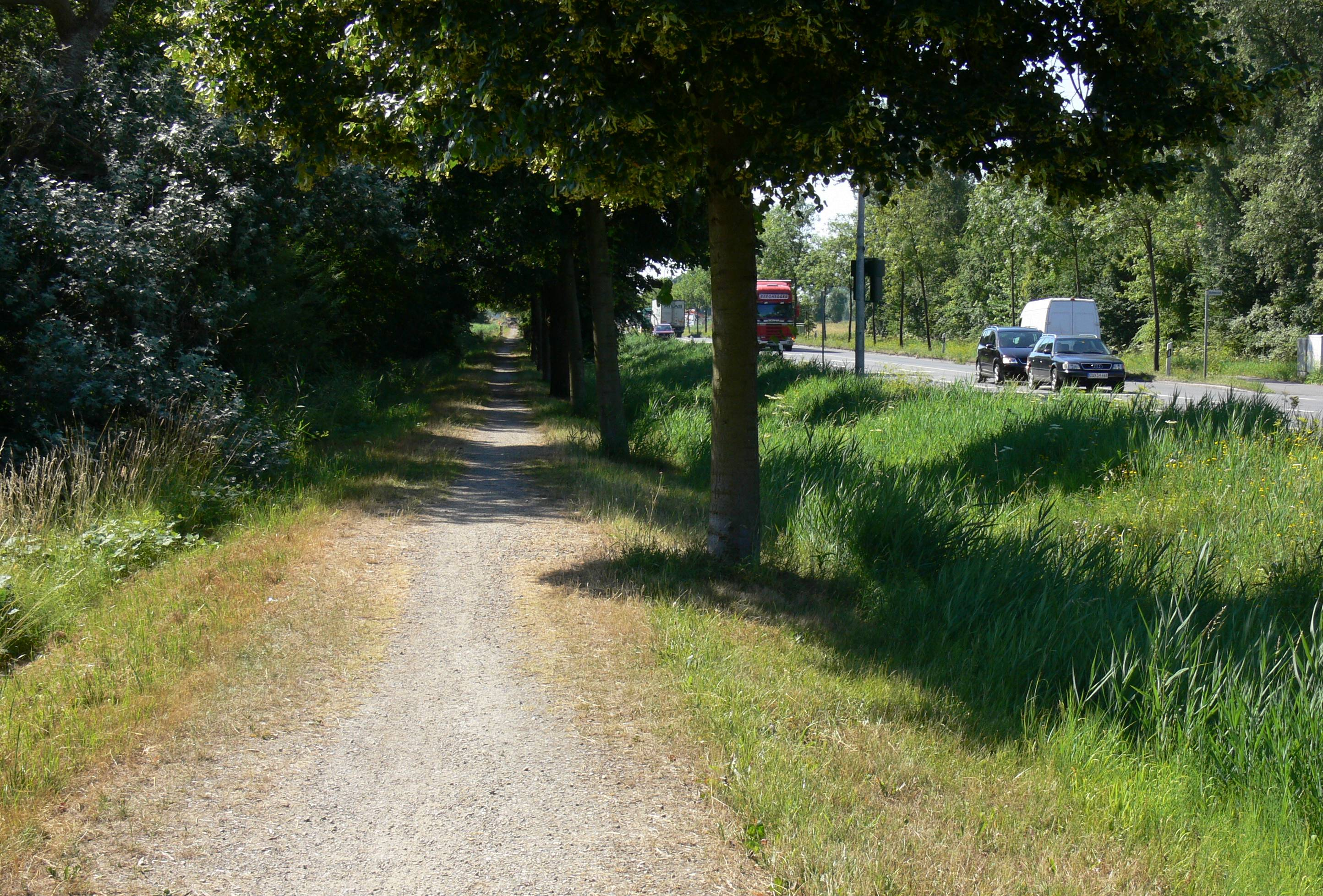 Radweg auf der Niederweserbahntrasse entlang der damaligen B 6 südlich von Bremerhaven